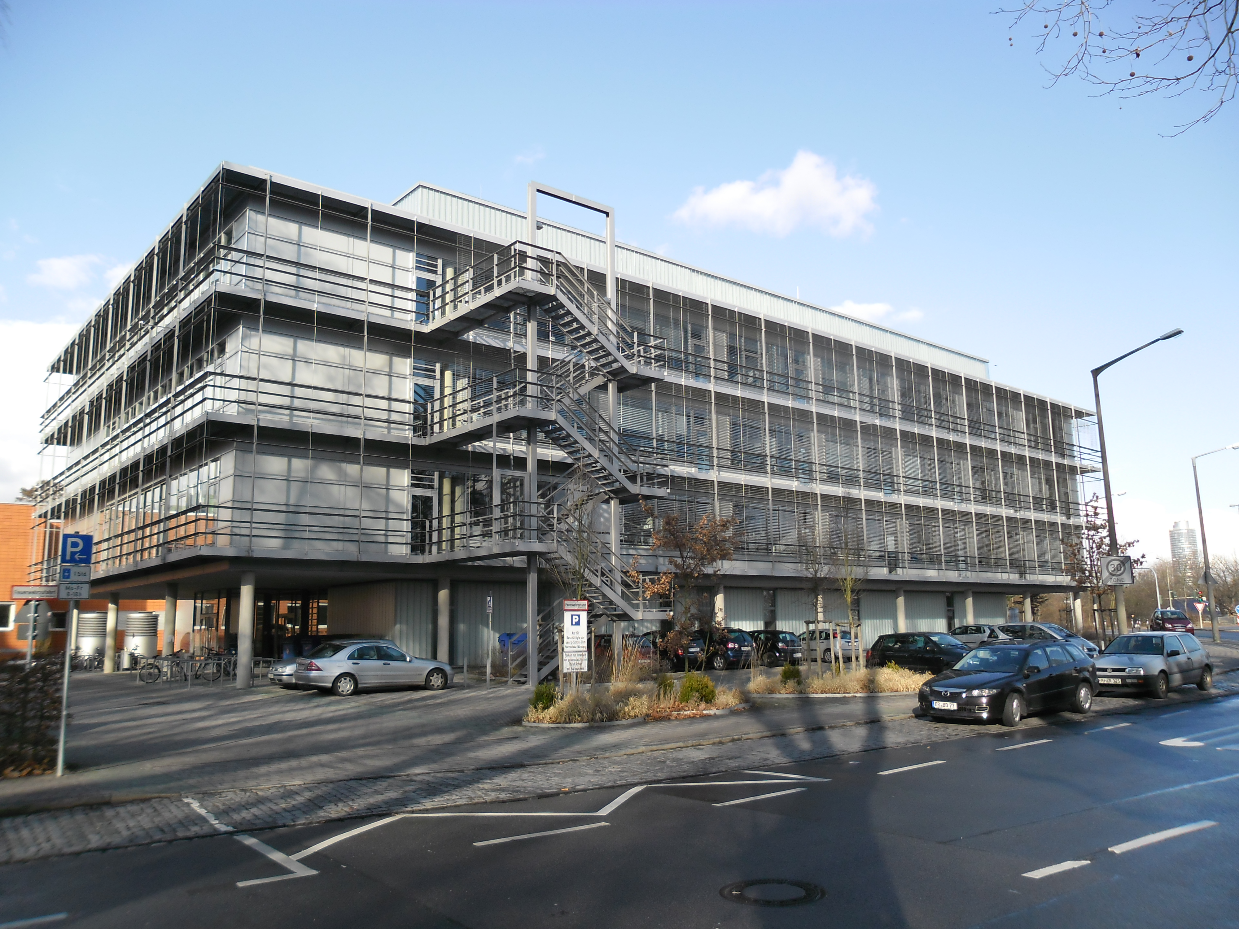 Gebäude des Standortes Kesslerplatz (KT-Gebäude) der Technischen Hochschule Nürnberg an der Ecke Wassertorstraße/Prinzregentenufer im Stadtbezirk Wöhrd